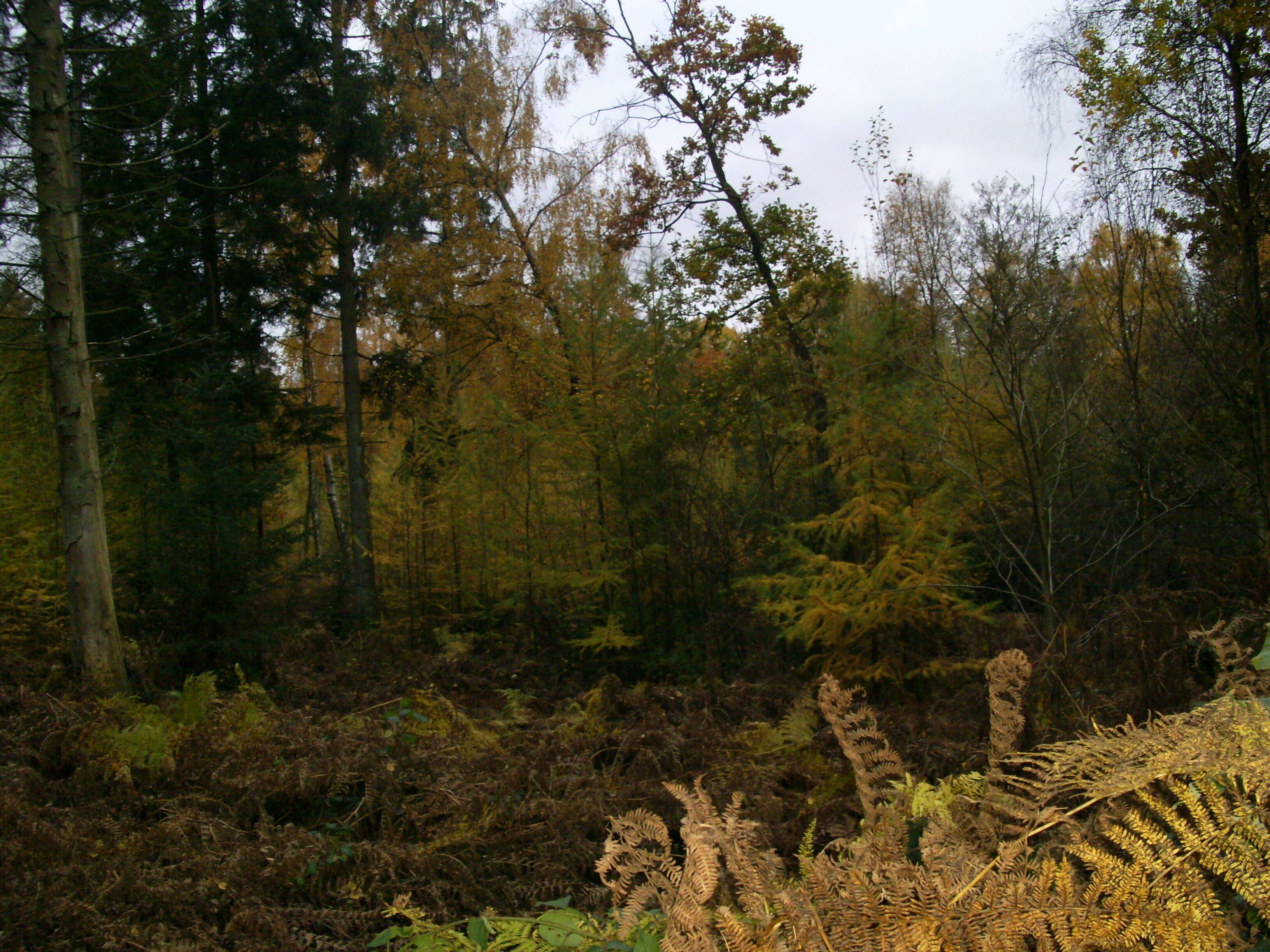 Herbstlicher Eindruck aus dem Glücksburger Forst